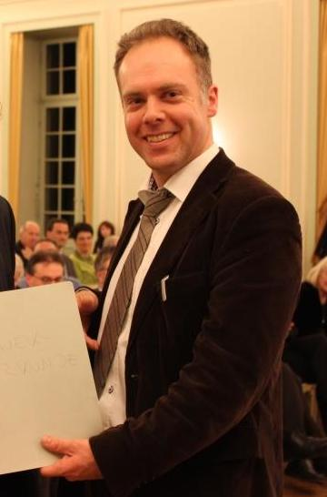 Wolf-Erich-Kellner-Preis Verleihung 2013. Mark Schweda, Laudator Prof. Dominik Geppert